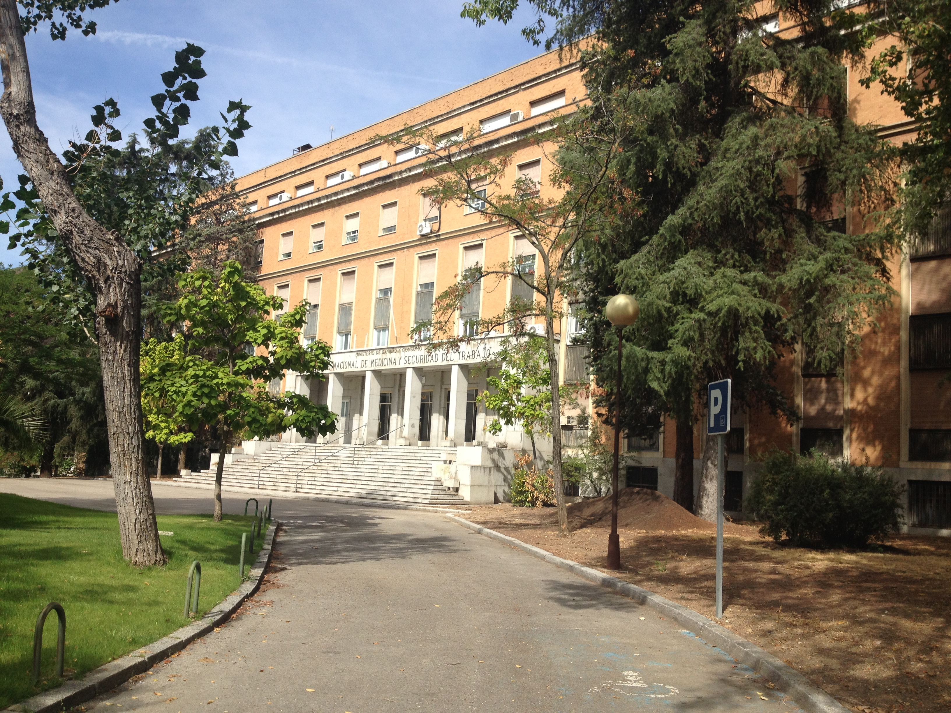 Pabellón 8 de la Facultad de Medicina de la Universidad Complutense de Madrid